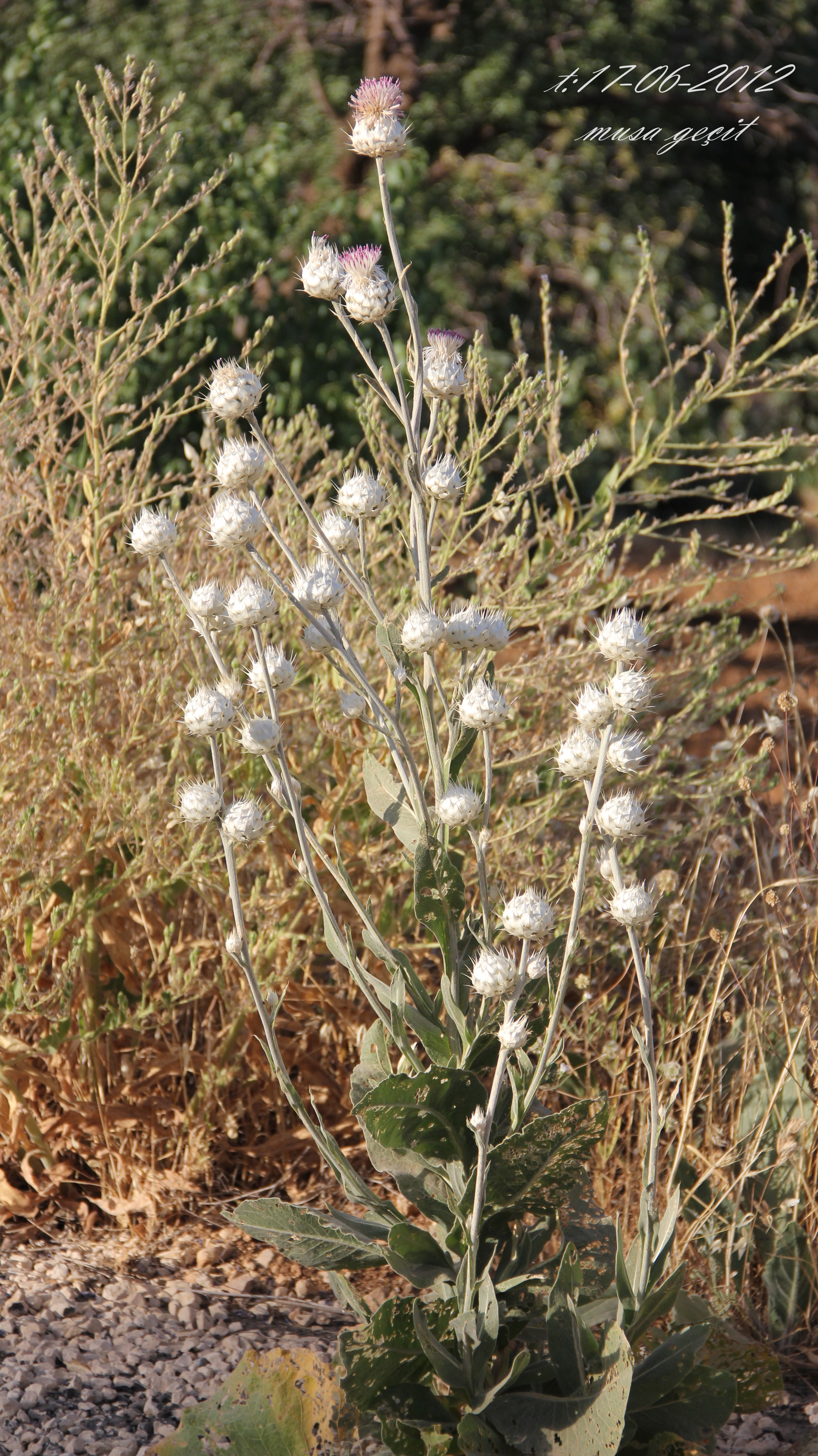 Yer:Mardin/ Centaurea kurdica